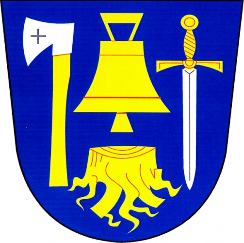 znak, Šumná, okres Znojmo